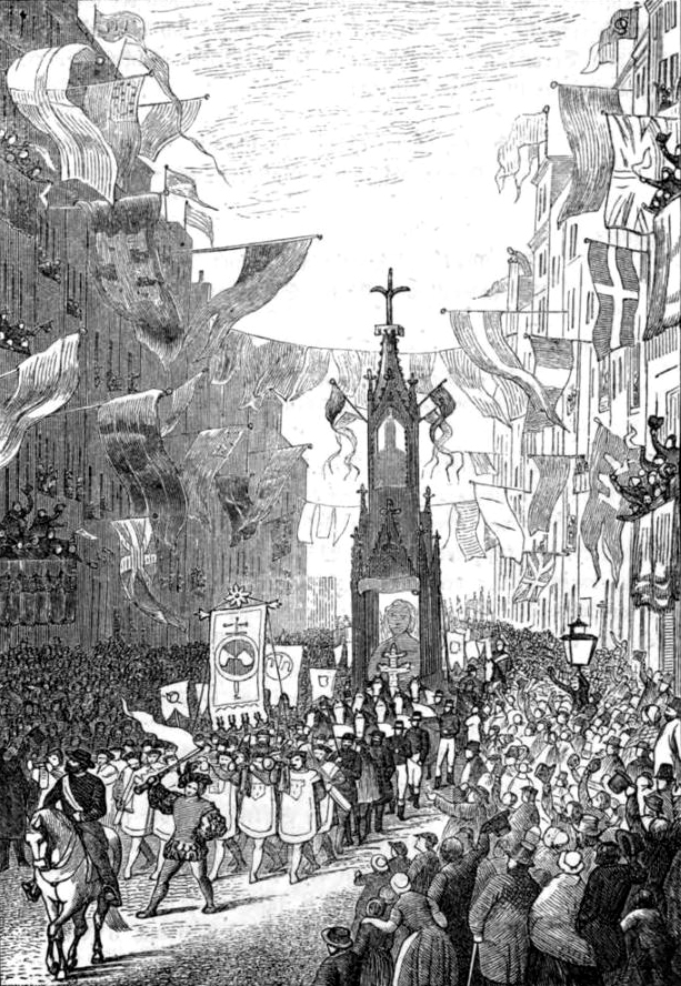 Der Hamburger Künstlerverein im Schiller-Festzug am 13. November 1859 (hinter den Musikanten in weißer Tracht). An der Spitze ritt der Bildhauer Ernst Gottfried Vivié, der auch ein Mitglied der Hamburgischen Bürgerschaft war